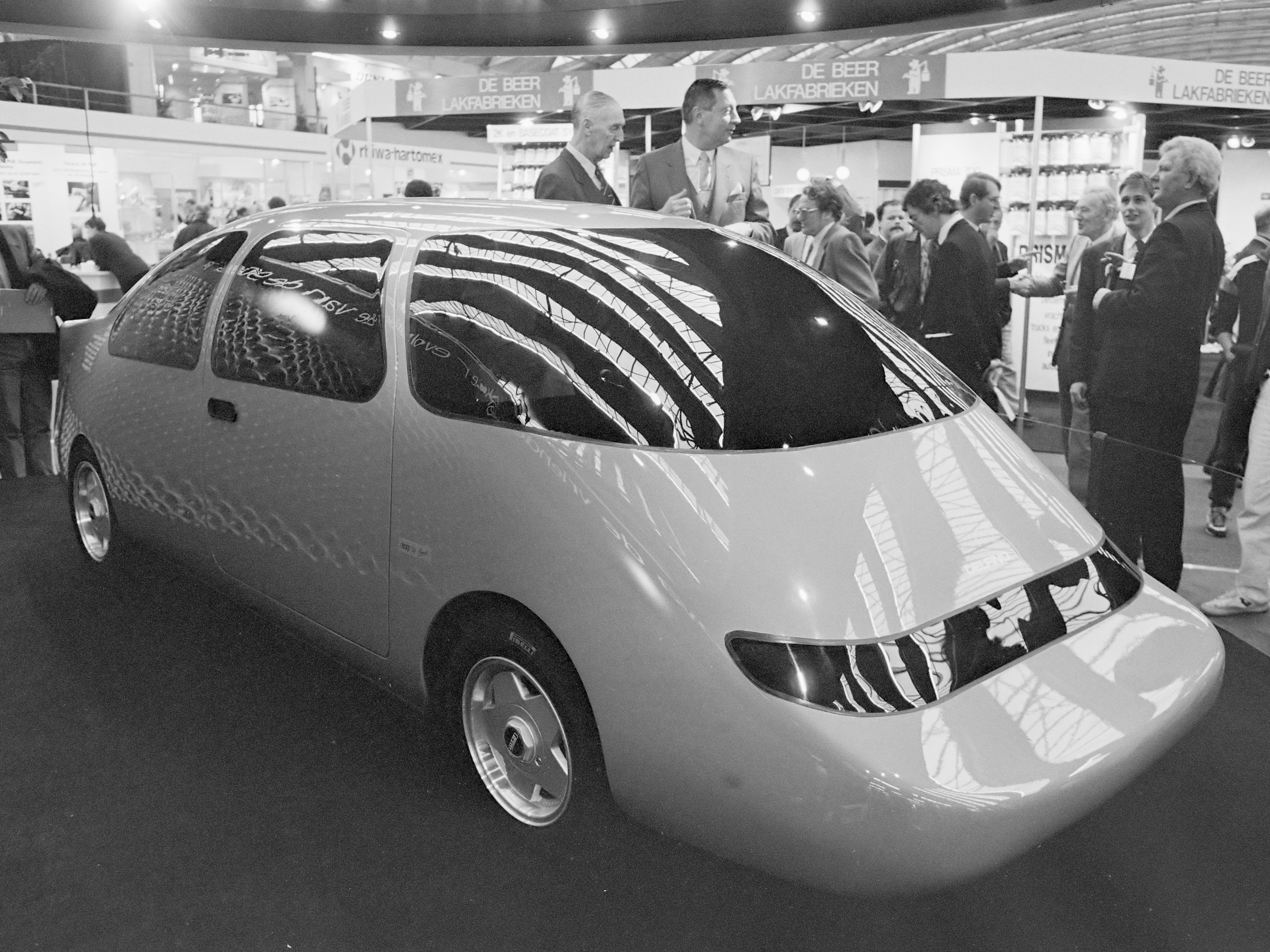 Autovak 89 in RAI. Een prototype van een supergestroomlijnde auto zoals ontworpen in 1947 door Hugenholtz 13 maart 1989